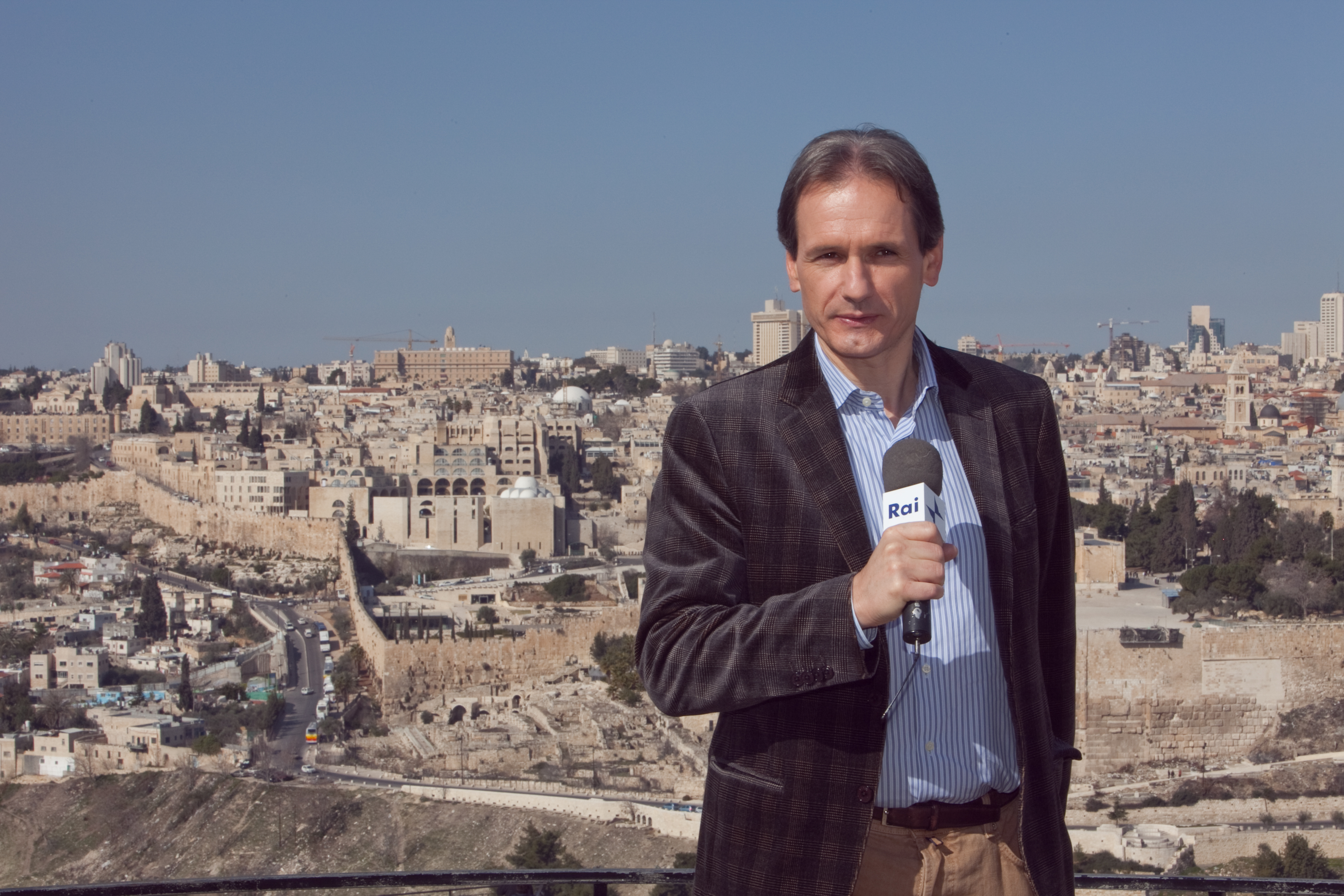 Claudio Pagliara, Gerusalemme, Monte degli Ulivi